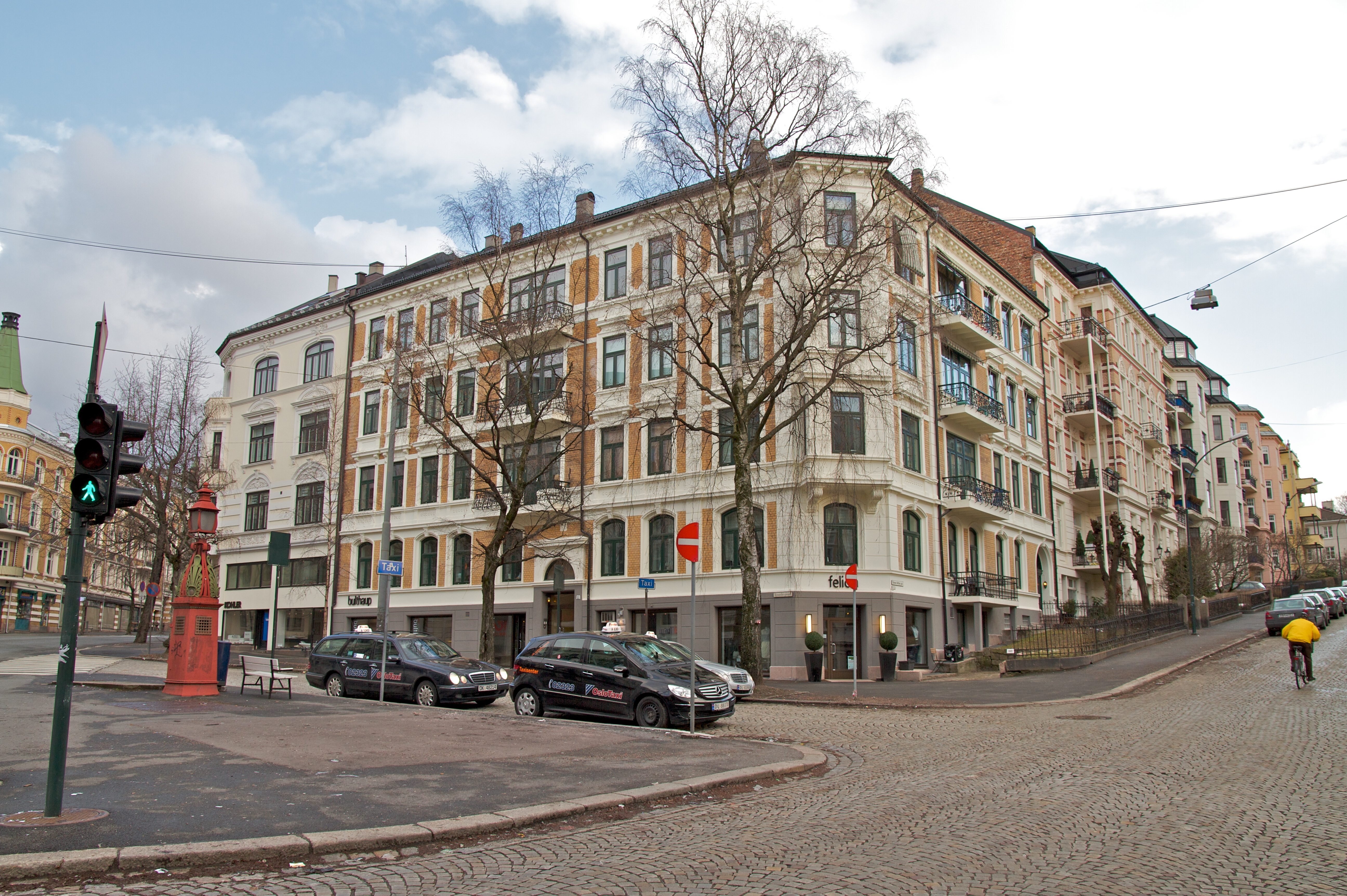 Elisenbergveien 11. Frogner i Oslo.